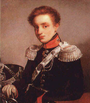 Портрет Великого князя Михаила Павловича